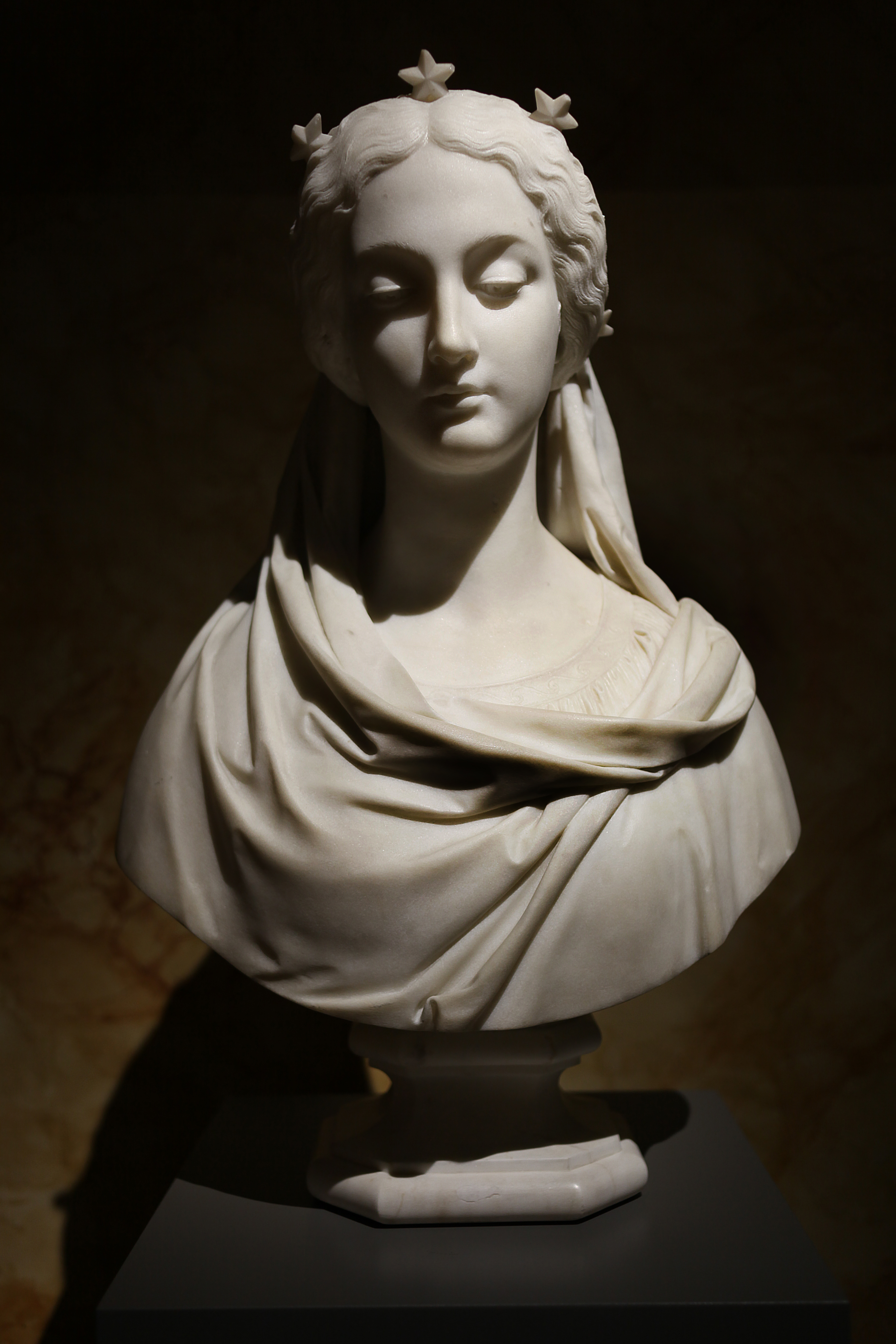 Giosuè Argenti (1819 – 1901) L'Immacolata (1865), esposta alla Galleria d'Arte Moderna di Milano